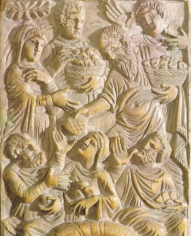 catedra